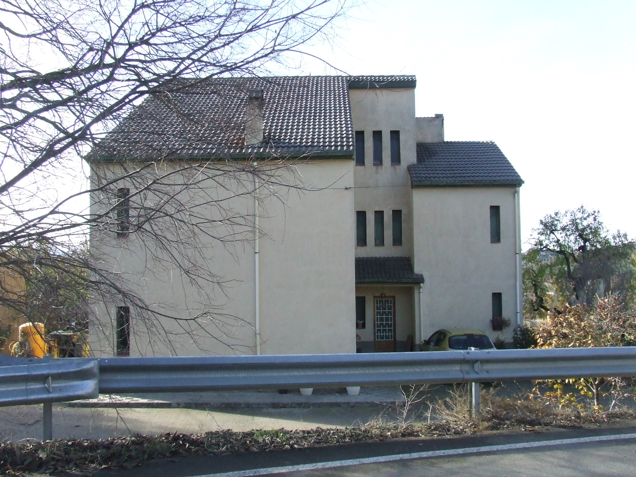 La part nova de Ca l'Isidre (Abella de la Conca, Pallars Jussà)